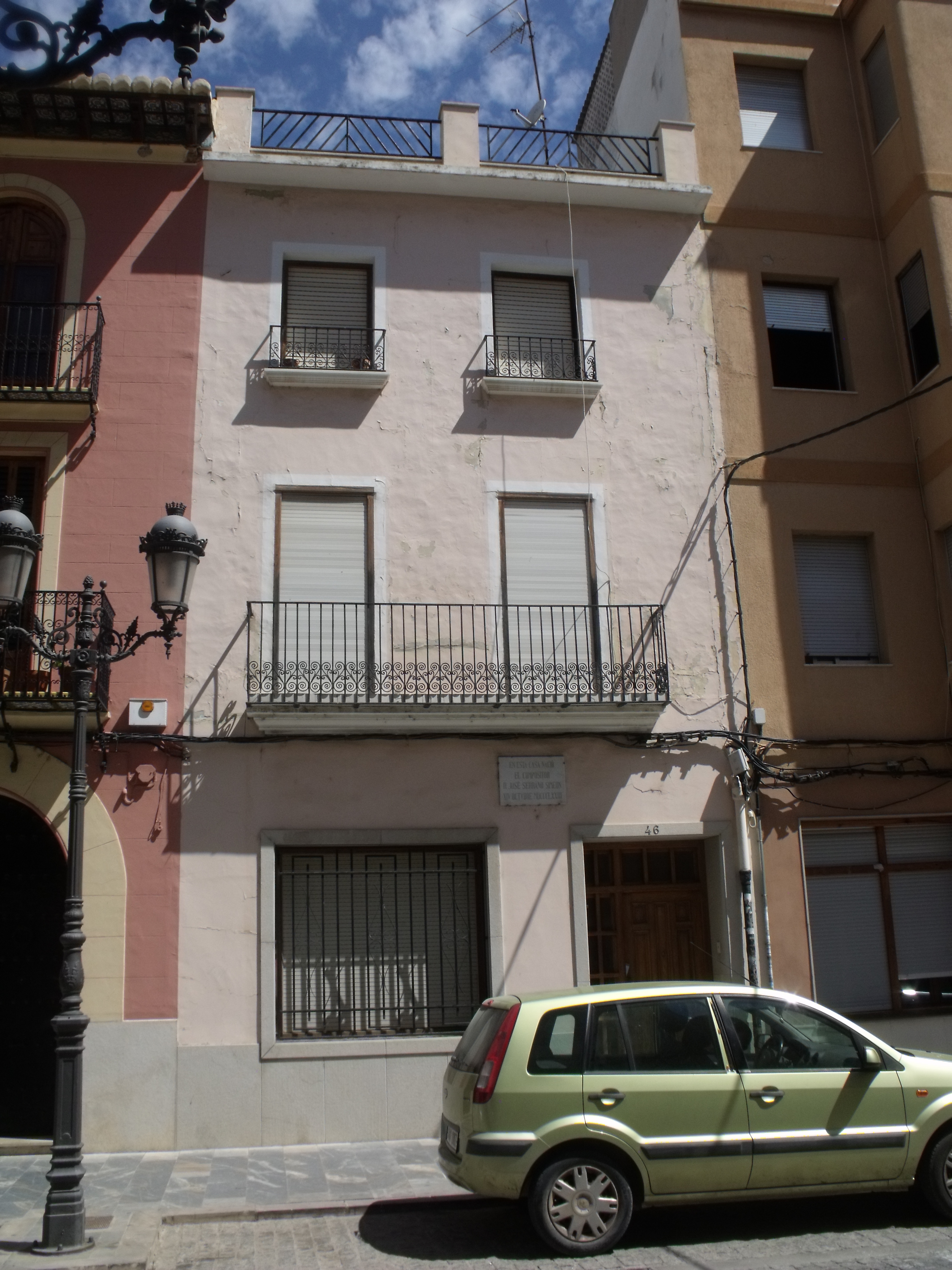 casa natal de José Serrano Simeón